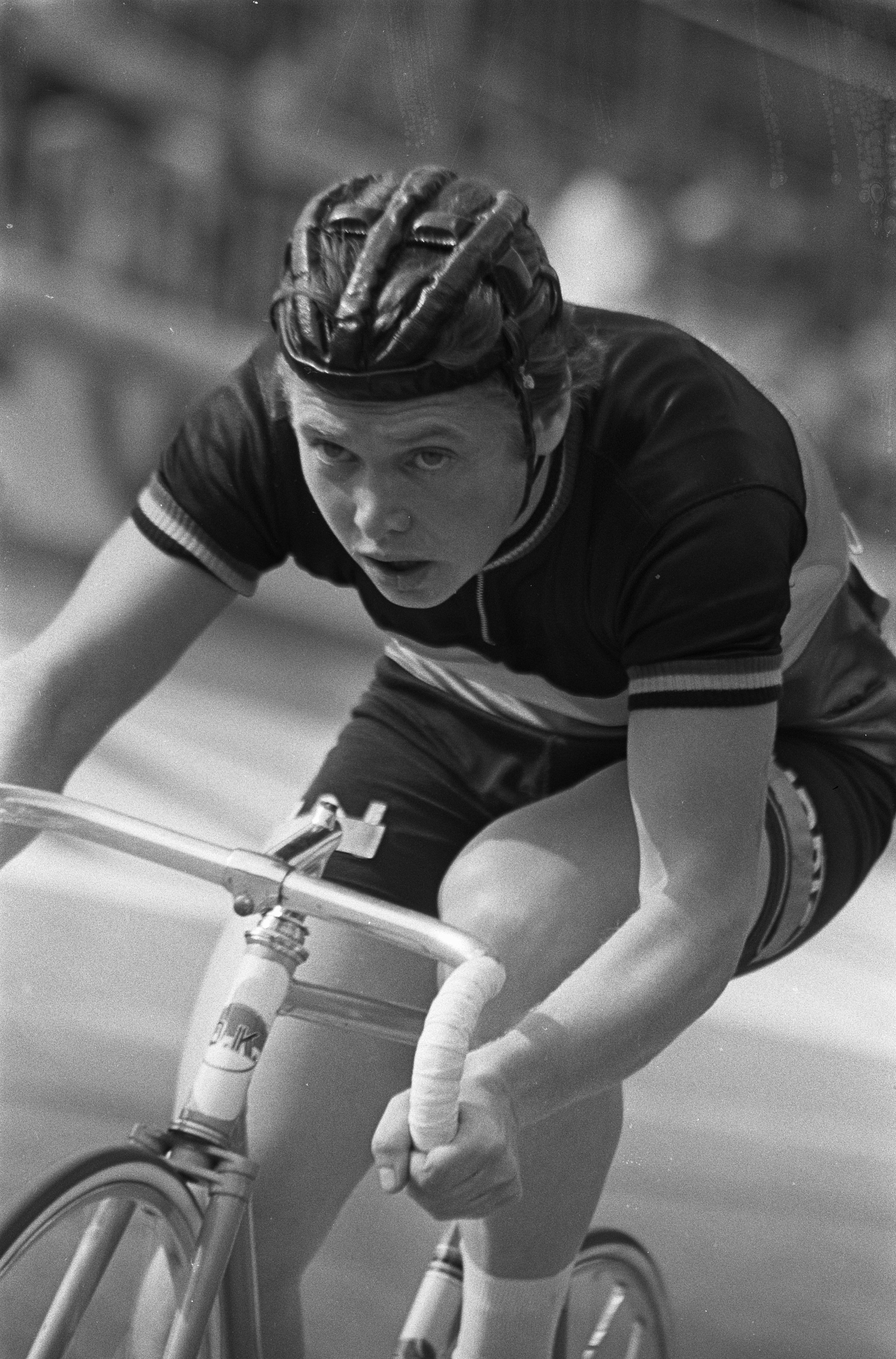 Collectie / Archief : Fotocollectie Anefo Reportage / Serie : [ onbekend ] Beschrijving : WK Wielrennen op de baan Amsterdam. fotonr. 9 Yvonne Reynders (Belgie) in aktie Datum : 27 augustus 1967 Locatie : Amsterdam, Noord-Holland Trefwoorden : sport, vrouwen, wielrennen Persoonsnaam : Reynders, Yvonne Fotograaf : Kroon, Ron / Anefo Auteursrechthebbende : Nationaal Archief Materiaalsoort : Negatief (zwart/wit) Nummer archiefinventaris : bekijk toegang 2.24.01.05 Bestanddeelnummer : 920-6974